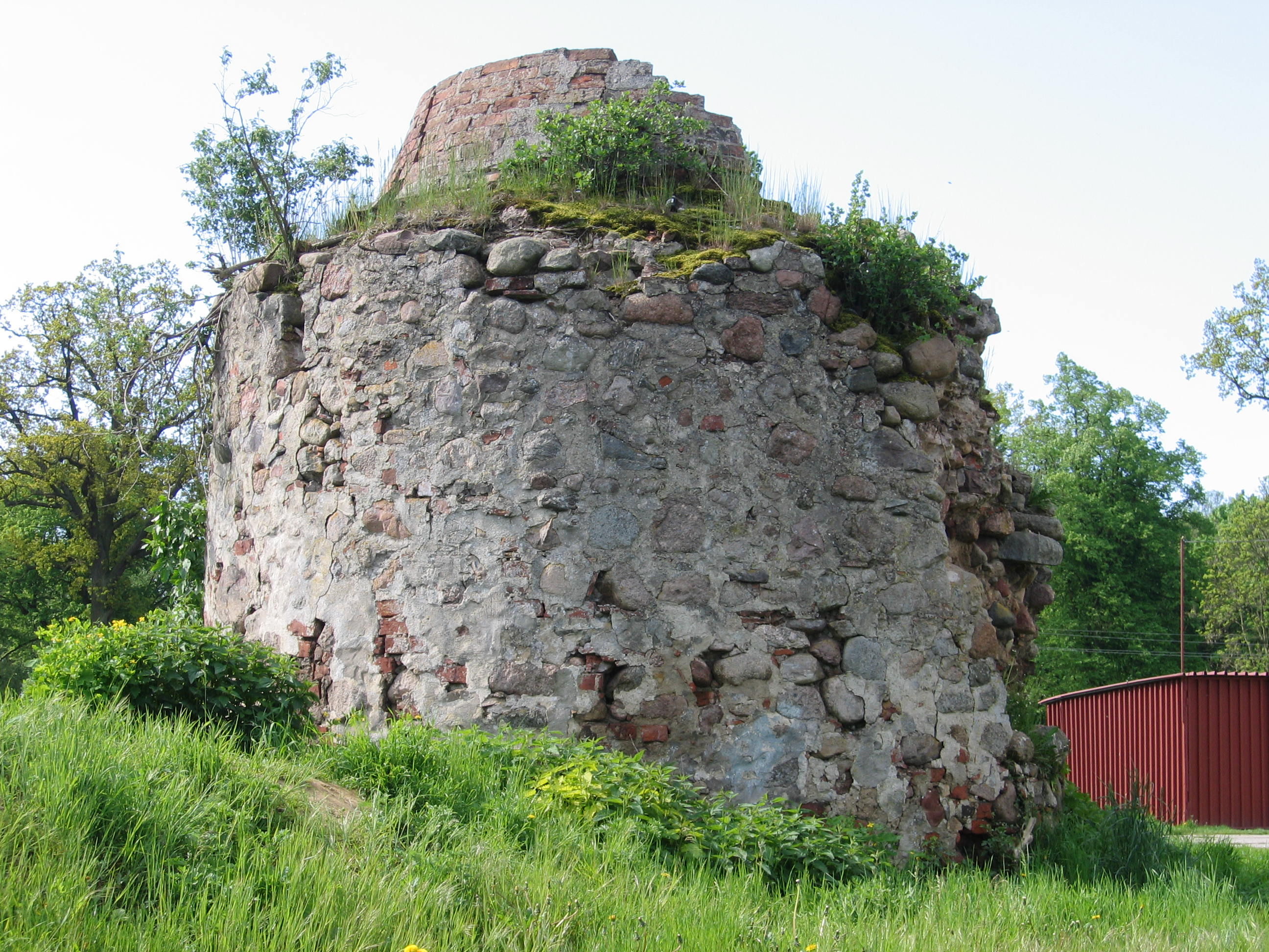 Ruiny wieży Stary Piotr w Morzycy, gmina Dolice